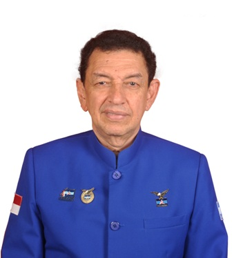 Potret dr. Ahmad Nizar Shihab, Sp.An sebagai calon Dewan Perwakilan Rakyat Republik Indonesia dari partai Demokrat